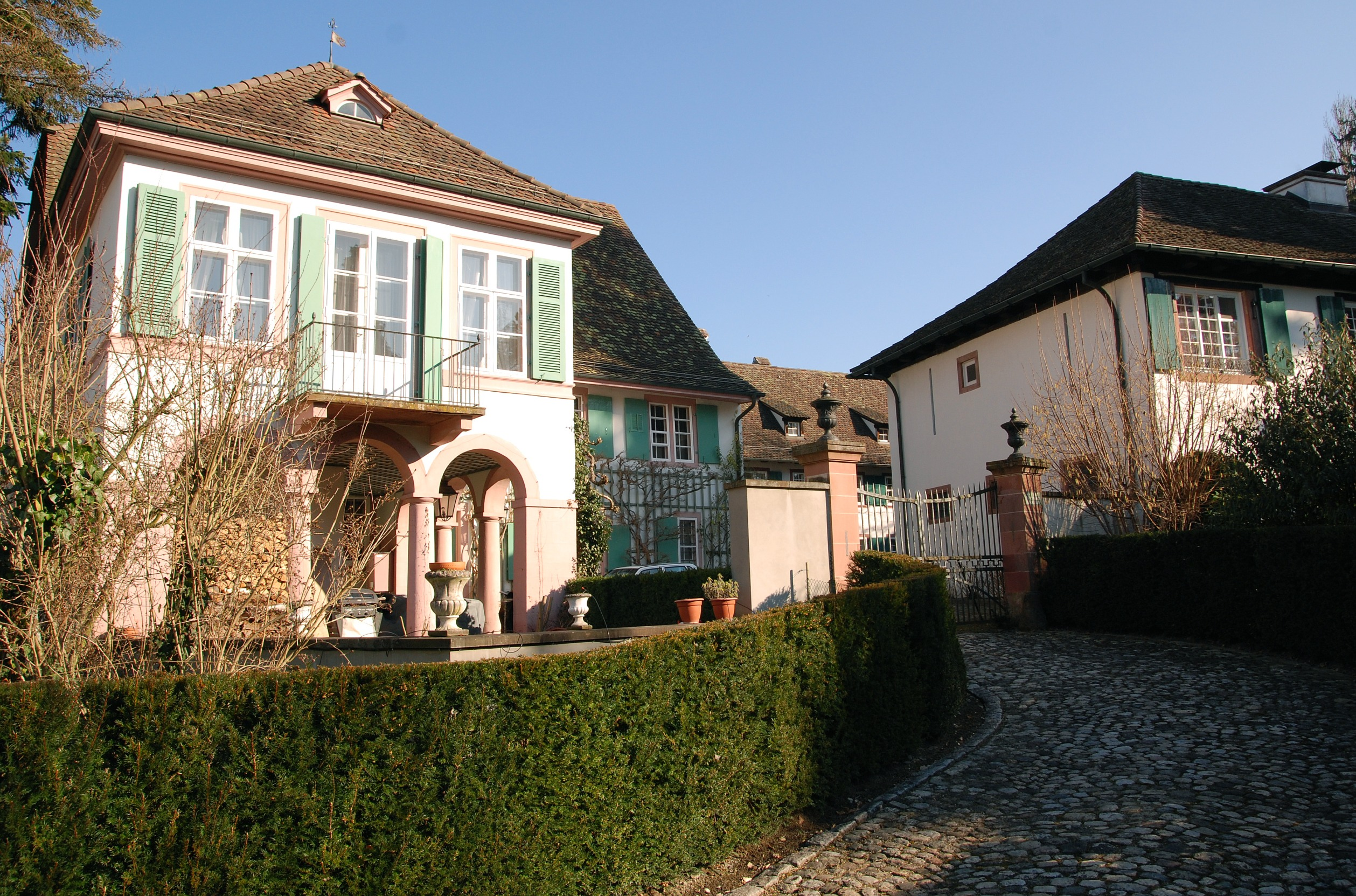 Alter Wenken im Wenkenhof, Riehen